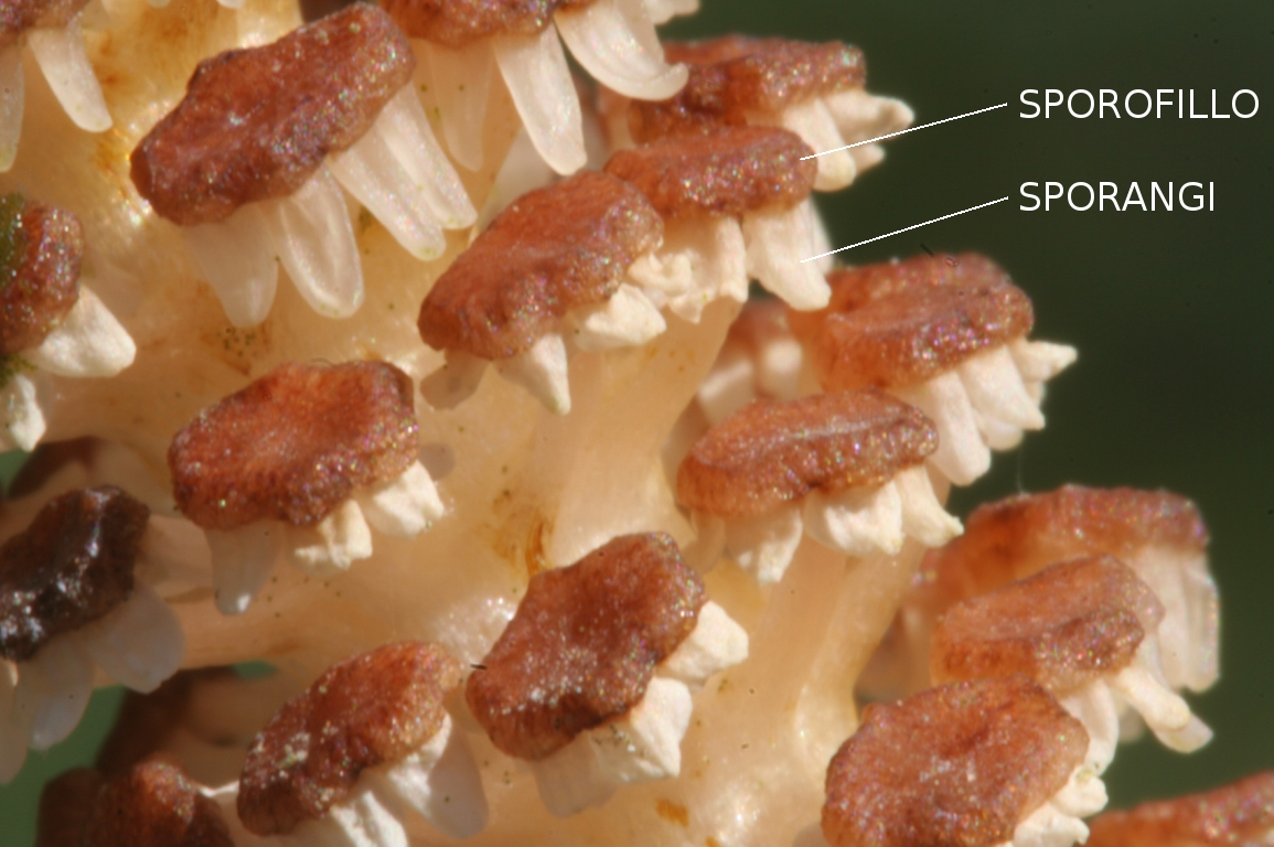 Equisetum_arvense (Equiseto dei campi) Località : Le Laste, Limana (BL), 661 m s.l.m.